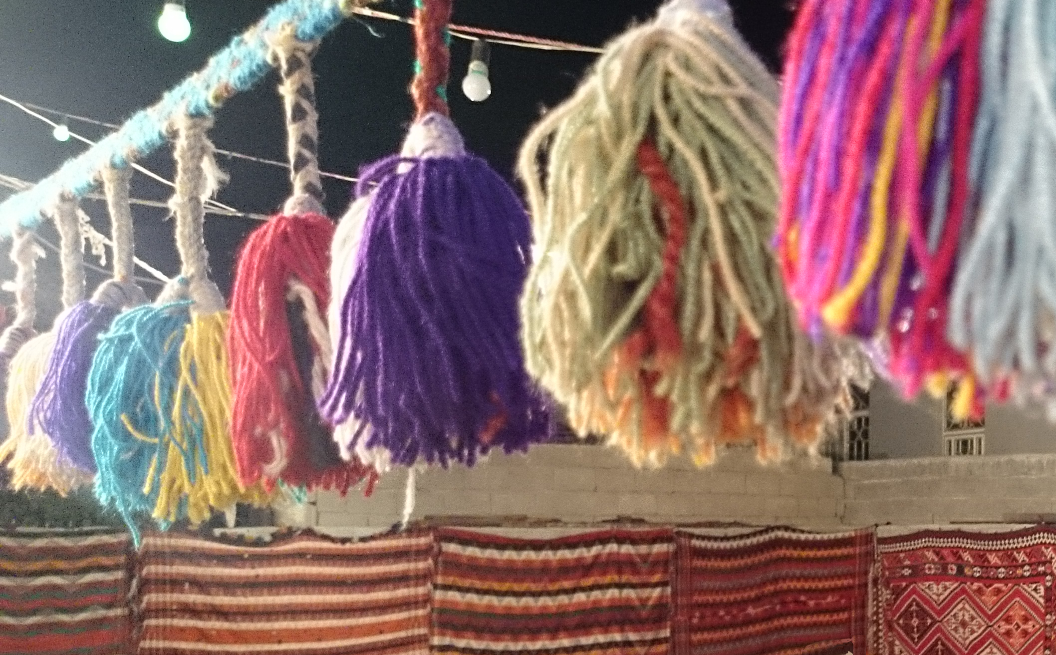 جاجیم و گمپل بافته شده در ایل باصری